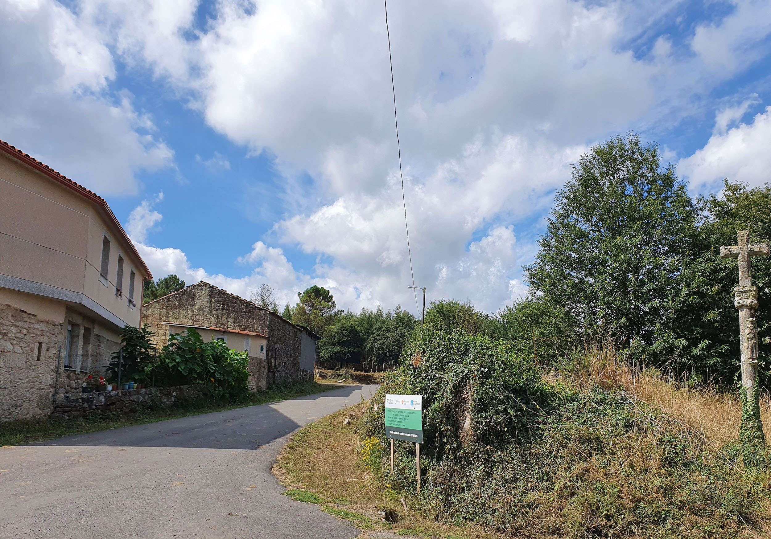 Lugar do Cruceiro, da parroquia de Cutián (Antas de Ulla). Cruce de camiños onde se atopa o que vai de Reboredo a Cutián co cruce de Martín a Penela. Unha única vivenda no lugar. Conta o lugar cun cruceiro de vara cilíndrica, adornada cunha figura dun pelegrín, capitel con formas florais e cruz latina sen imaxes.